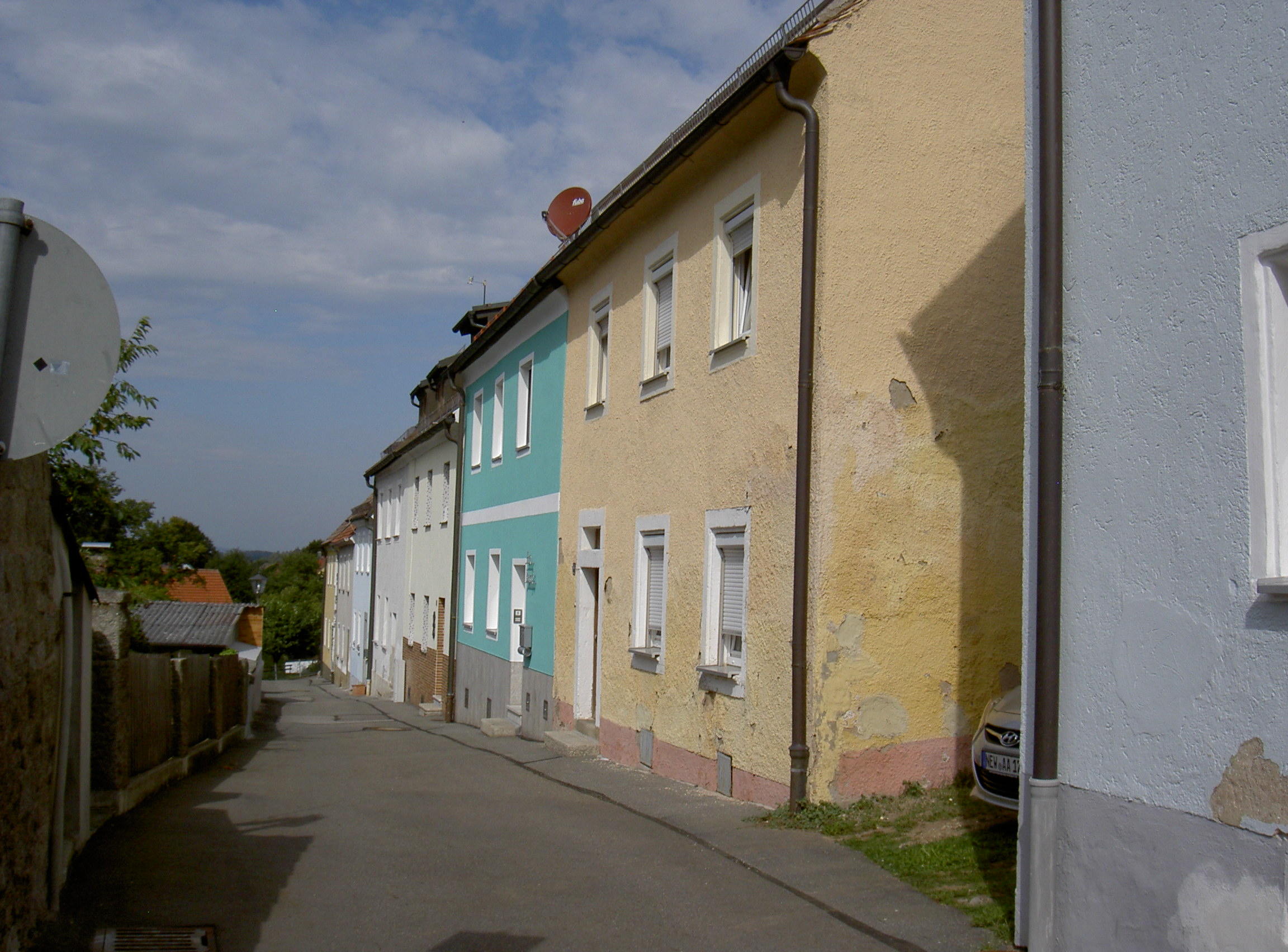 Ensemble ehemaliges Judenviertel in Floß (Upper Palatinate)